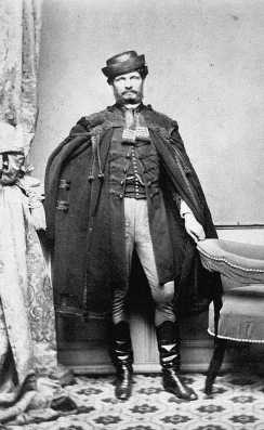 gróf Andrássy Gyula politikus, miniszterelnök. Simonyi Antal felvétele